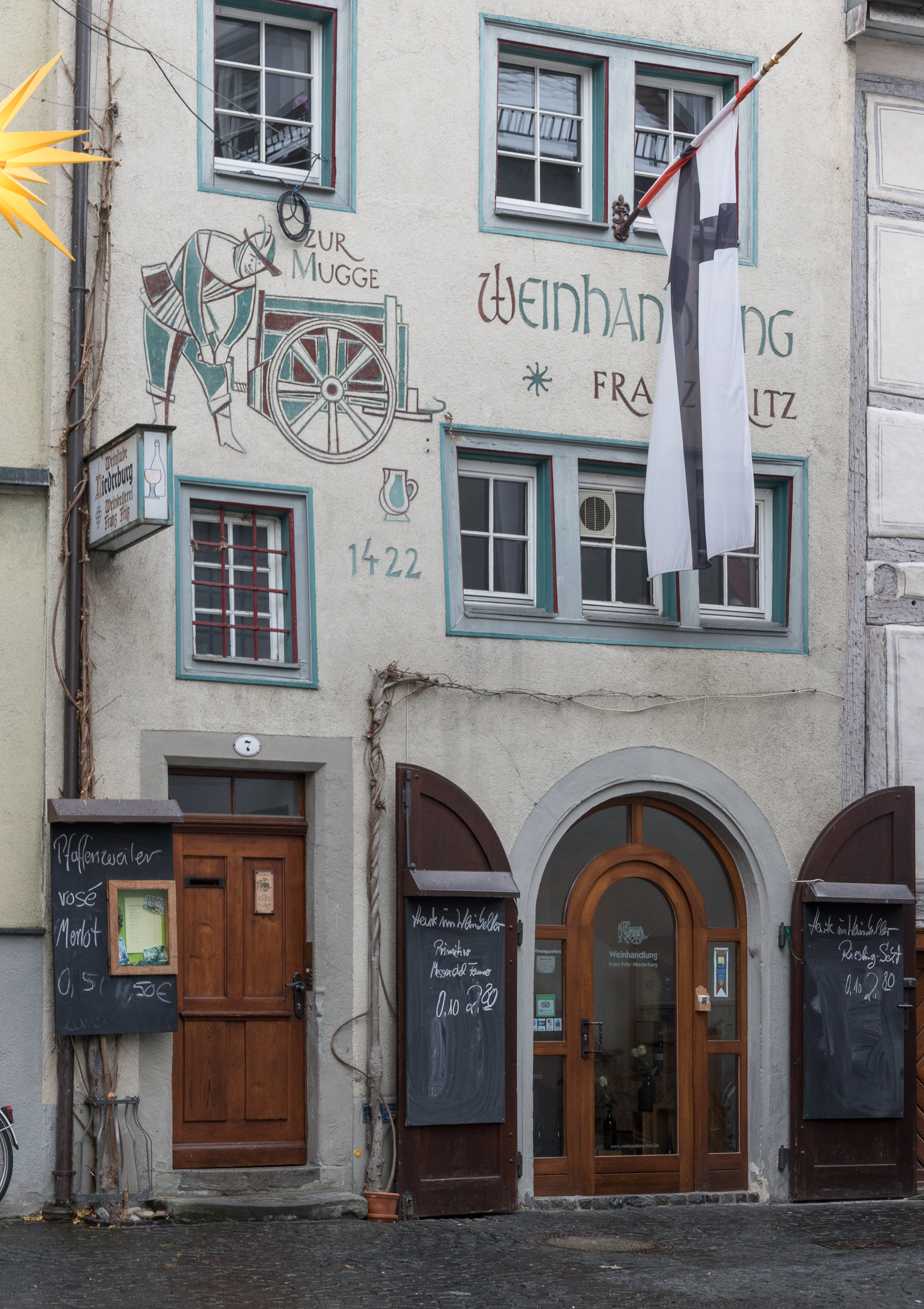 "Zur Mugge" (1422), Niederburggasse 7 in Konstanz